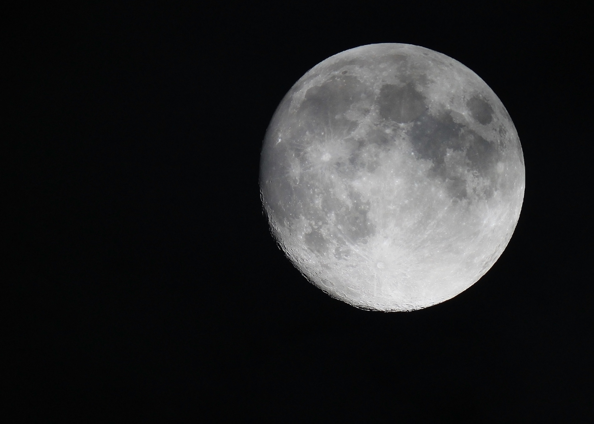 Photo de presque pleine Lune prise avec un appareil-photo réflex numérique monté sur une lunette Orion 80ED